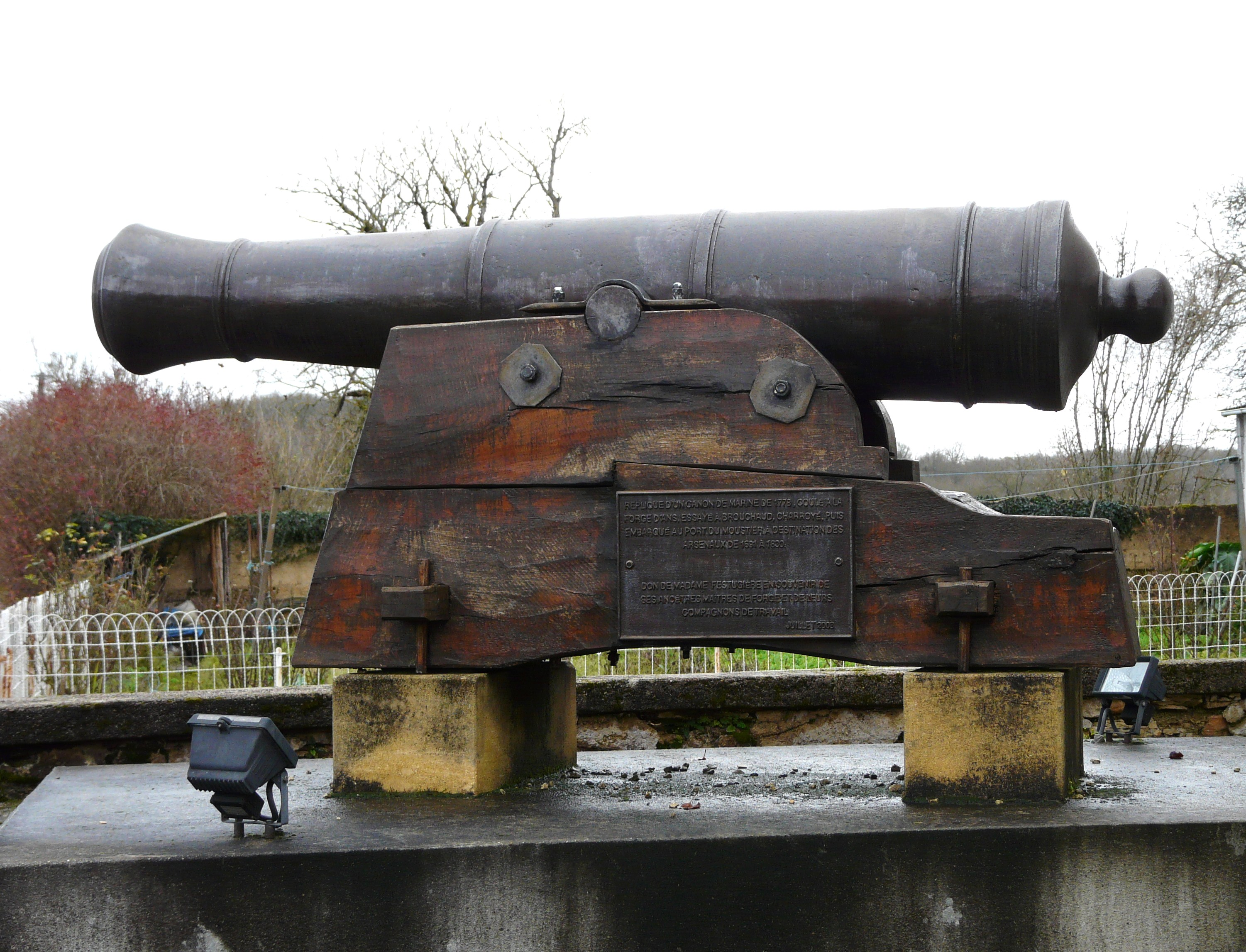 Reproduction d'un canon de marine de 1778 coulé à la forge d'Ans, La Boissière-d'Ans, Dordogne, France